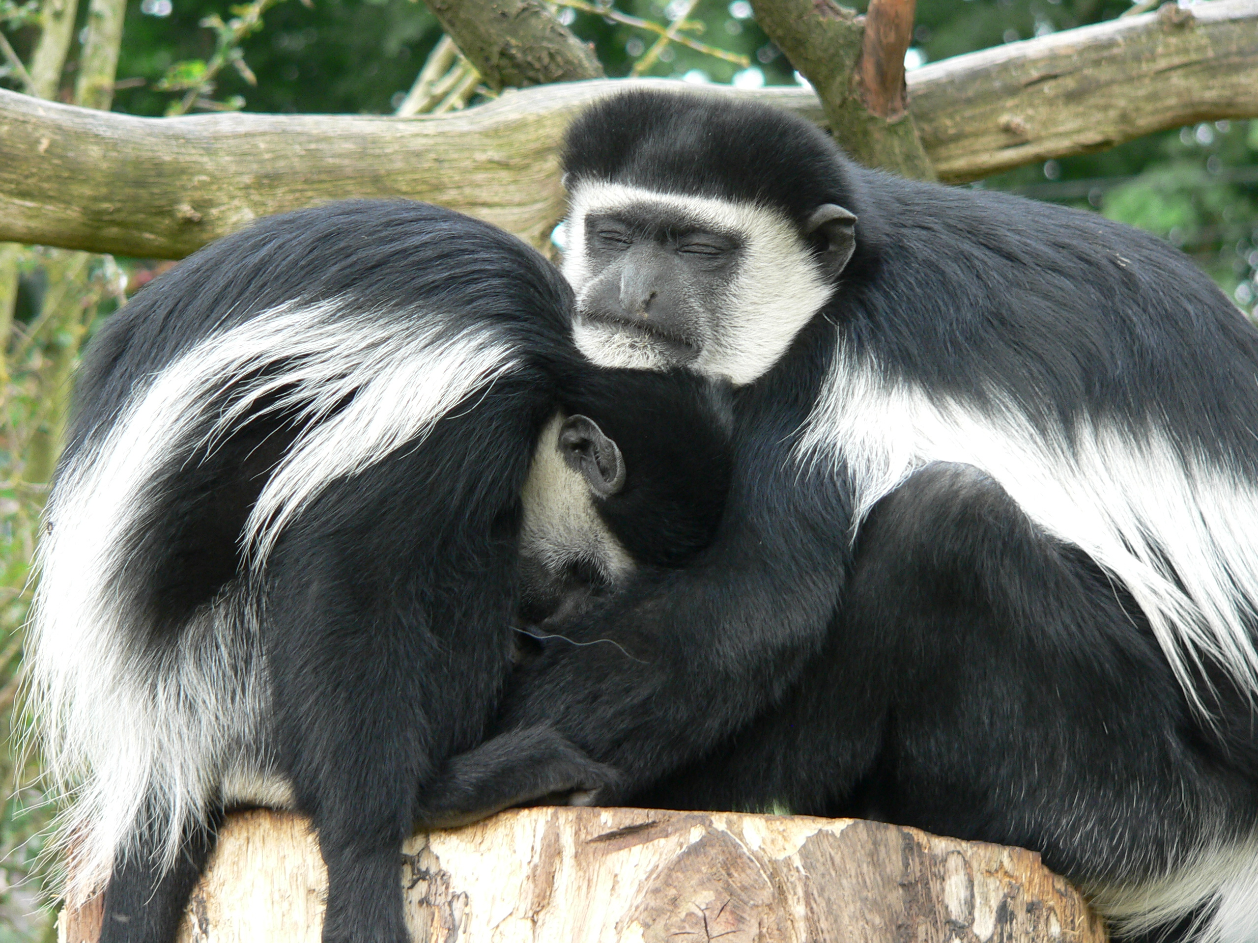 Colobus guereza